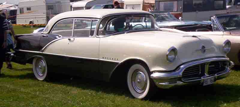 Oldsmobile Super 88 Holiday 1956